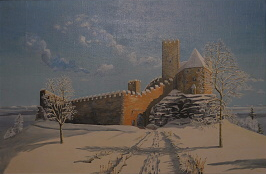 Hrad Choustník, olej na plátně 105x69 cm